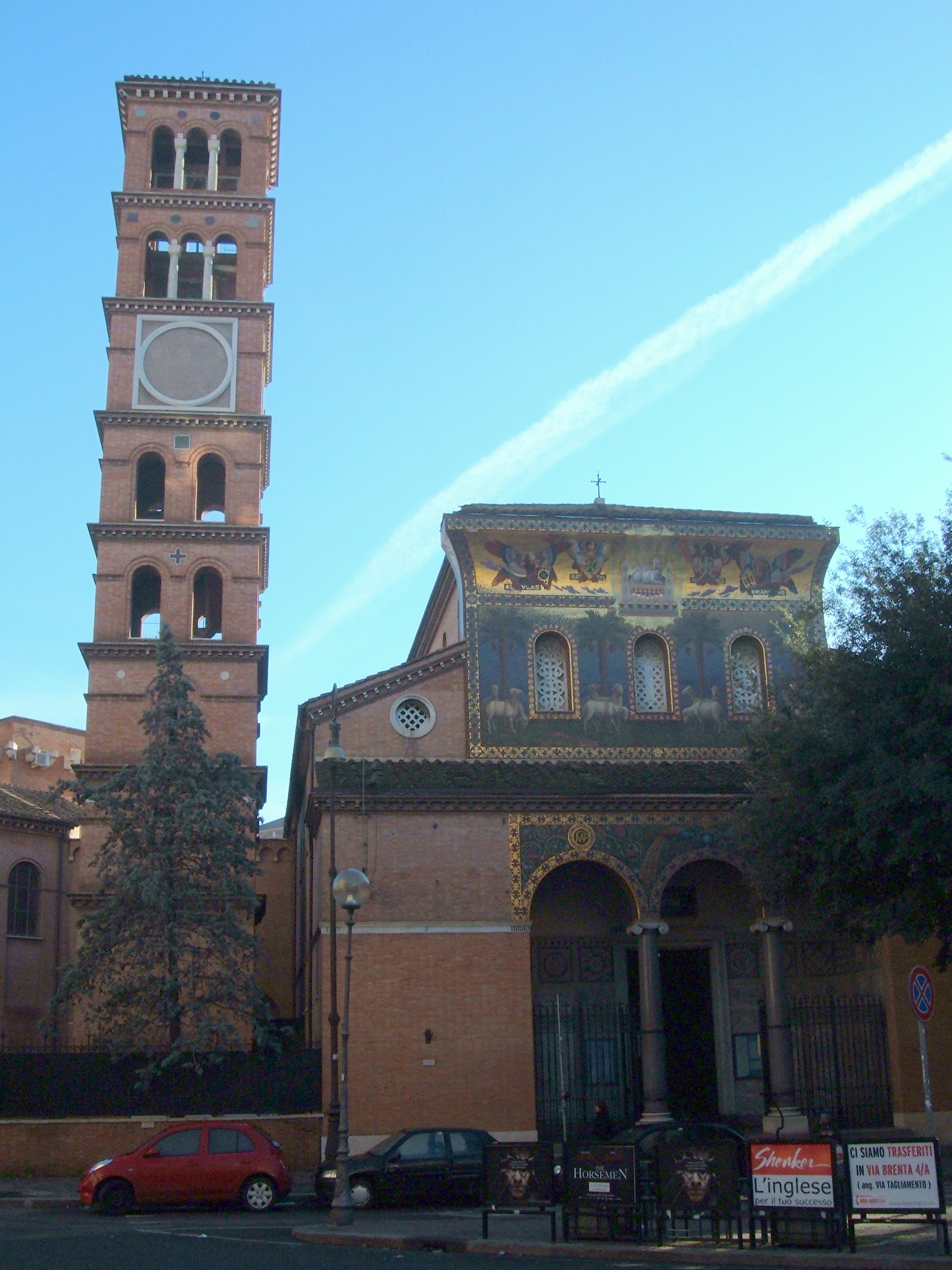 Chiesa di Santa Maria Addolorata a piazza Buenos Aires, a Roma, nel quartiere Trieste.